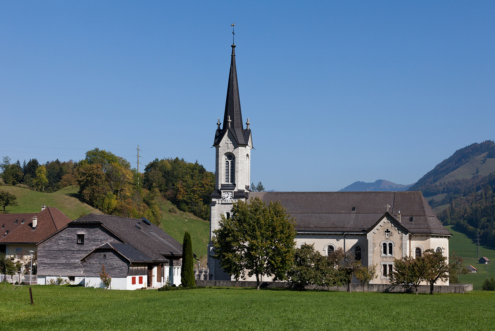 Eglise Saint Grat in Montbovon (FR)